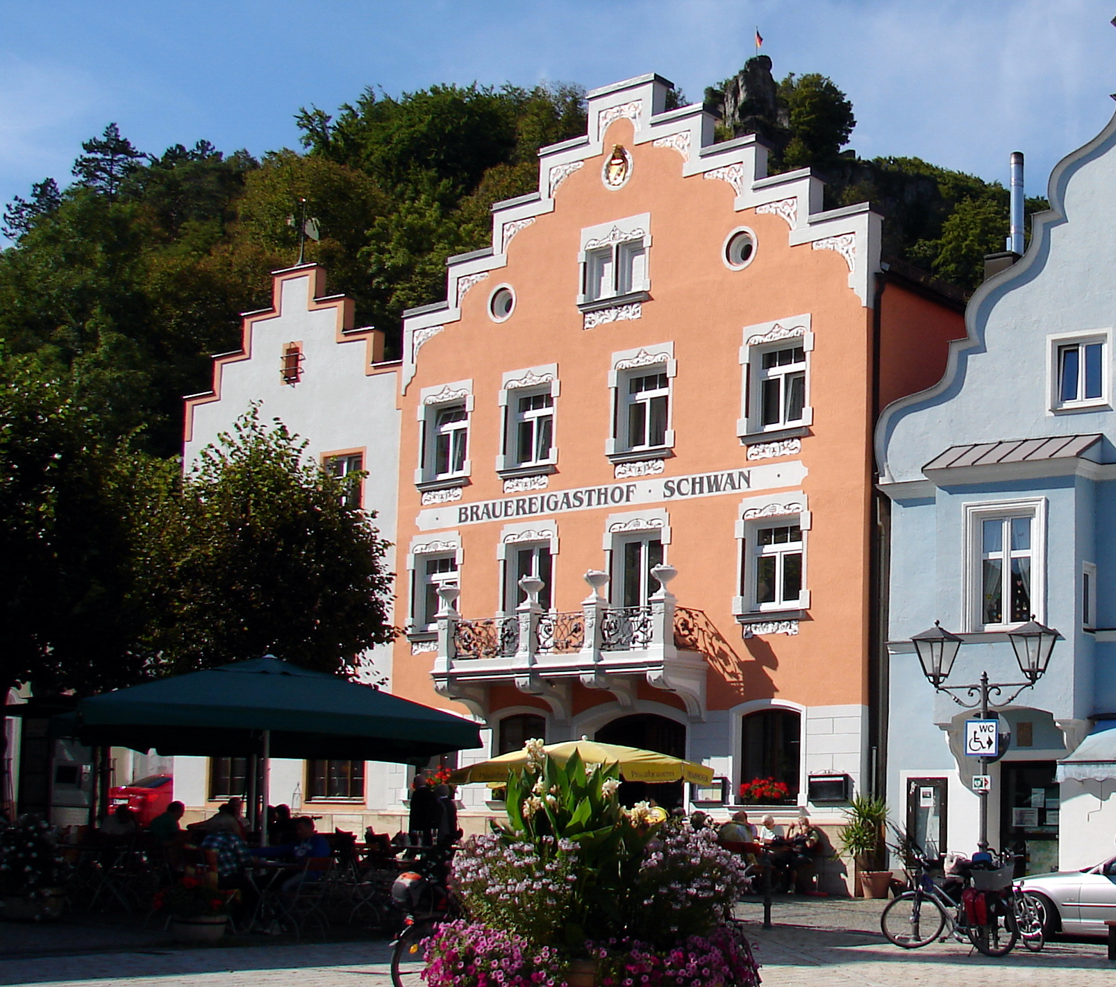 Hotel Schwan, zwei zusammengefaßte dreigeschossige Giebelbauten mit Treppengiebeln, im Kern wohl 17./18. Jahrhundert, Fassadendekor in barockisierendem Jugendstil, um 1900.